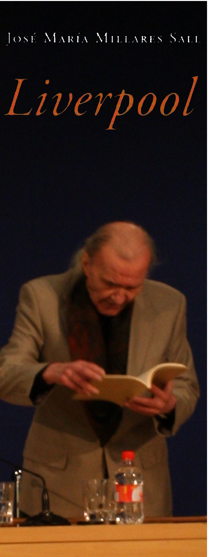 FOTOGRAFÍA REALIZADA EN EL HOMENAJE REALIZADO A jOSÉ MARÍA MILLARES SALL EN LA PRESENTACIÓN DEL LIBRO "LIVERPOOL"